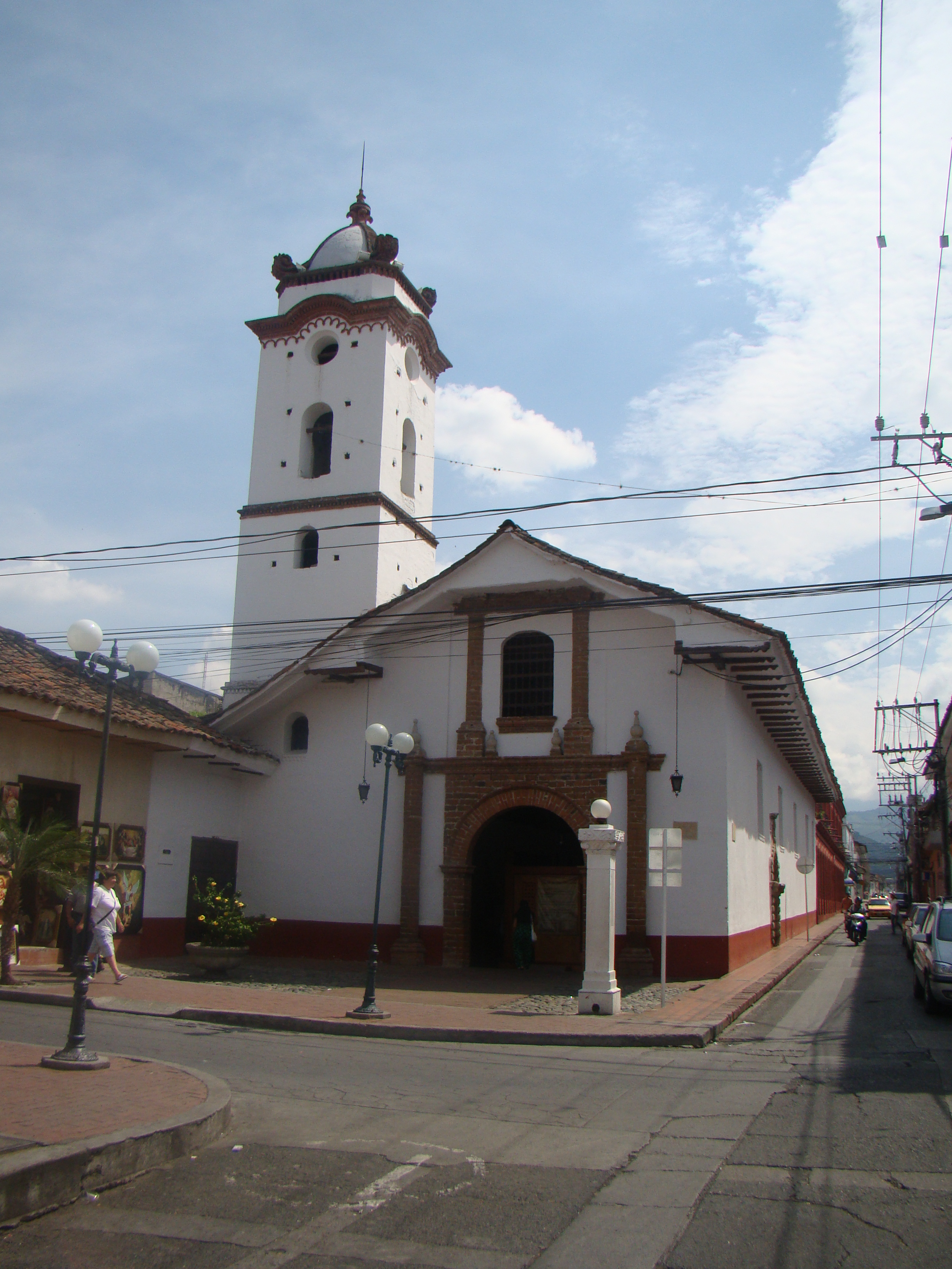 Sector Antiguo de la ciudad de Buga